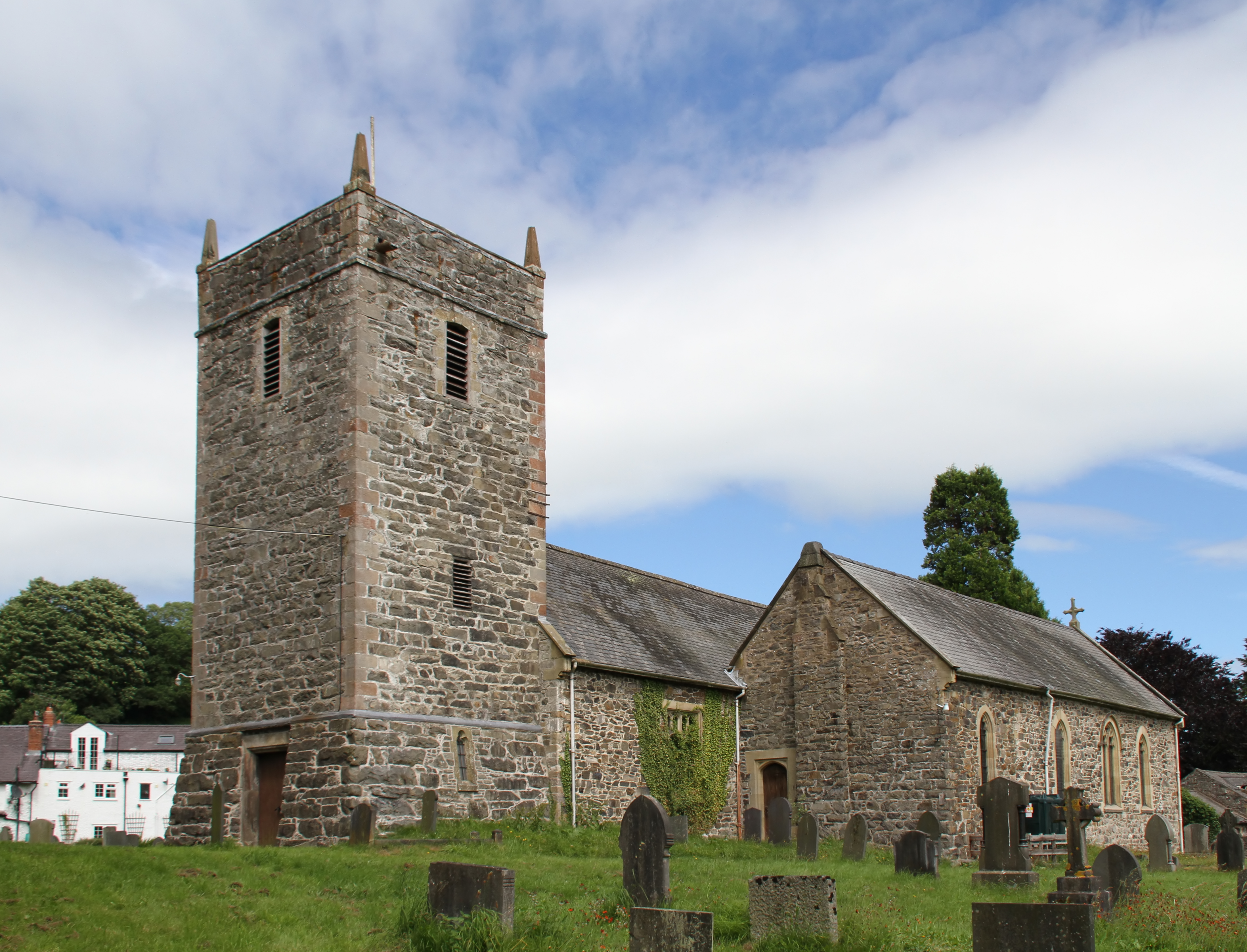 St Dogfan's Church Llanrhaeadr-ym-Mochnant